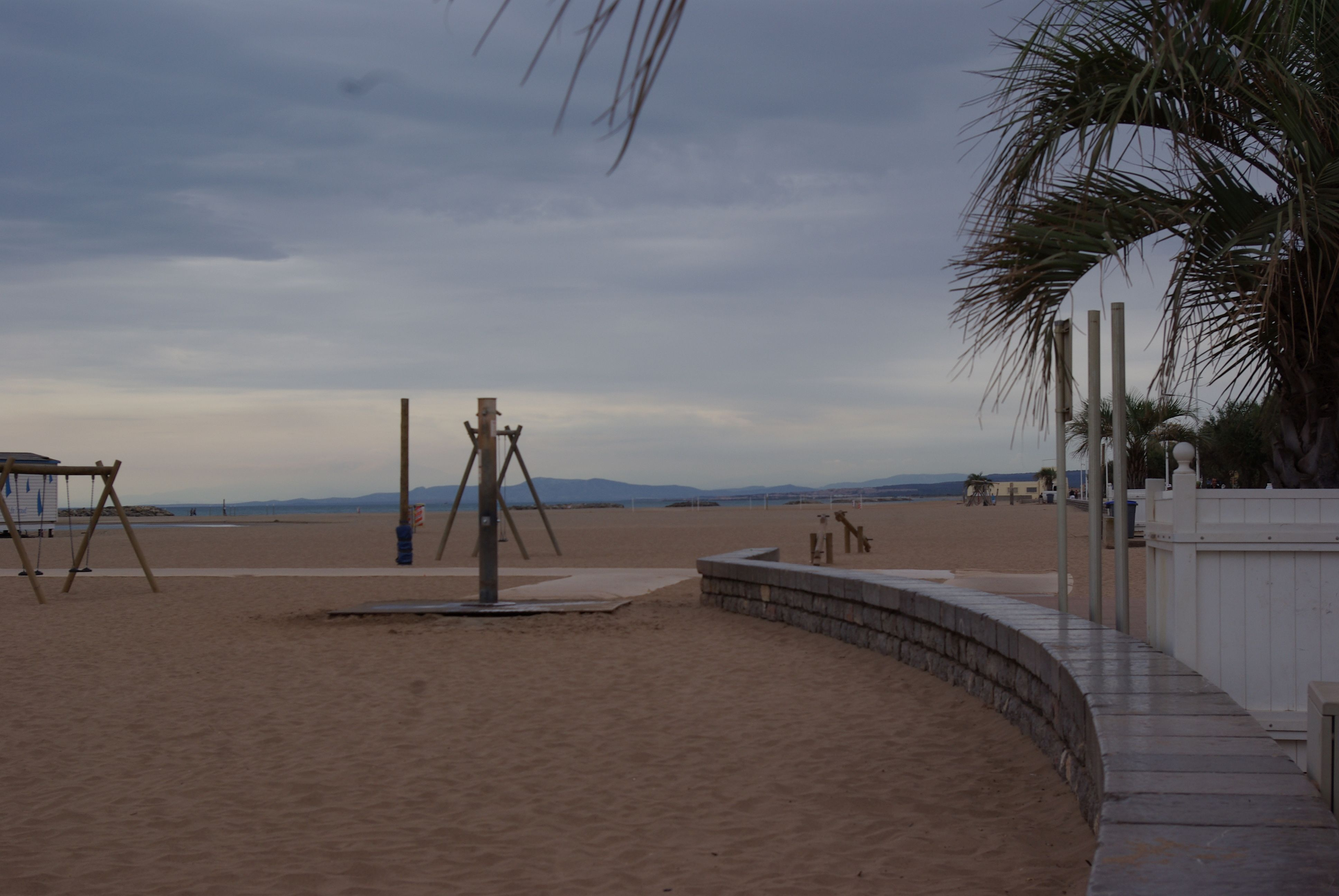 Valras-Plage in Frankreich. Der Ort befindet sich an der Mittelmeerküste.